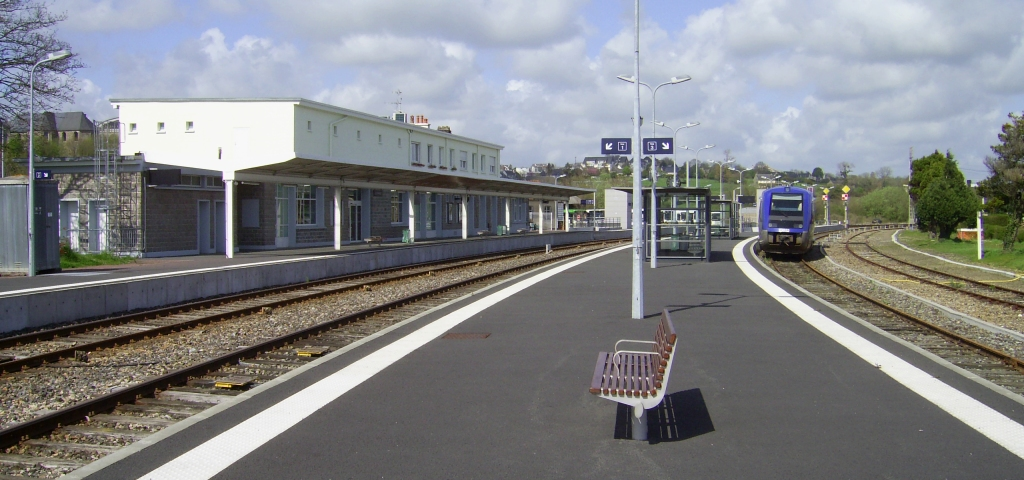 Gare de Coutances